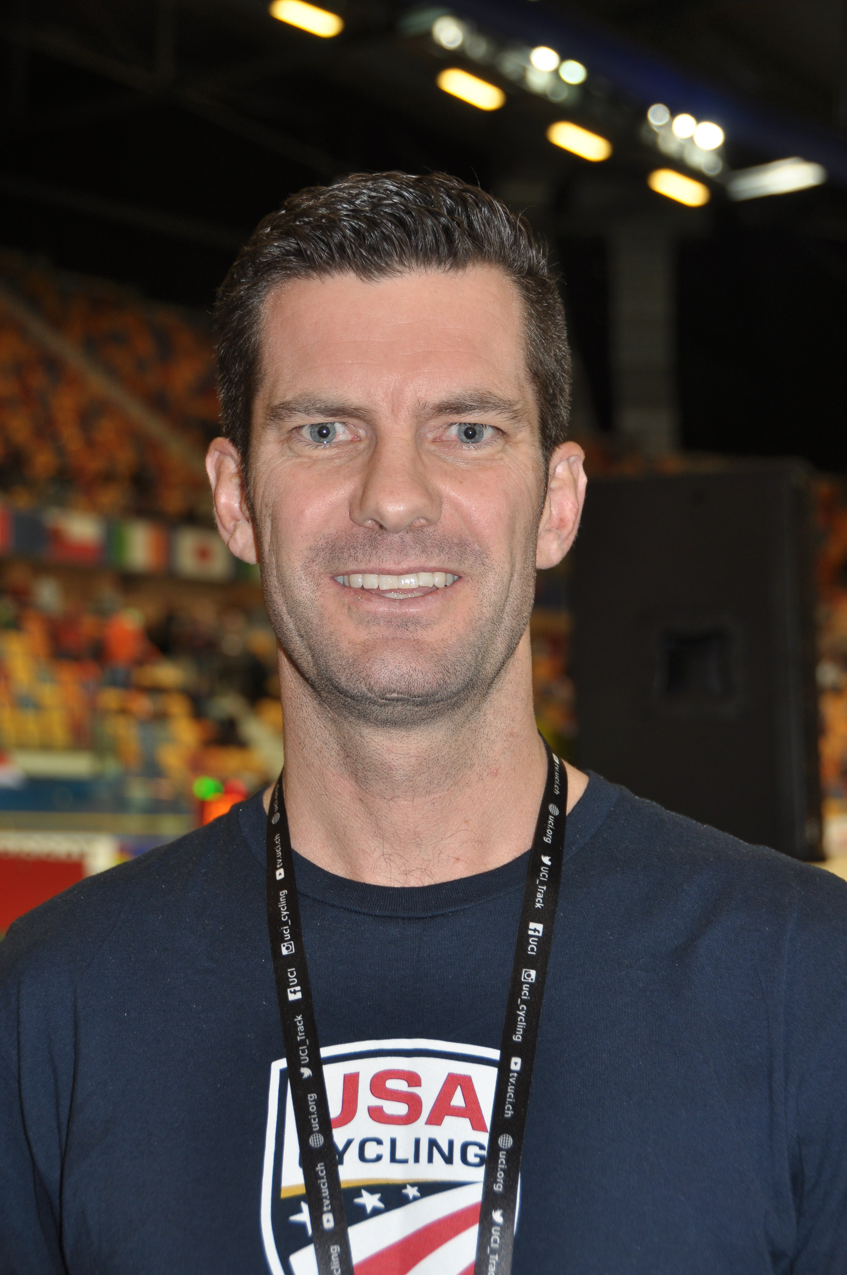 Greg Henderson, US-amerikanischer Trainer und ehem. Radsportler